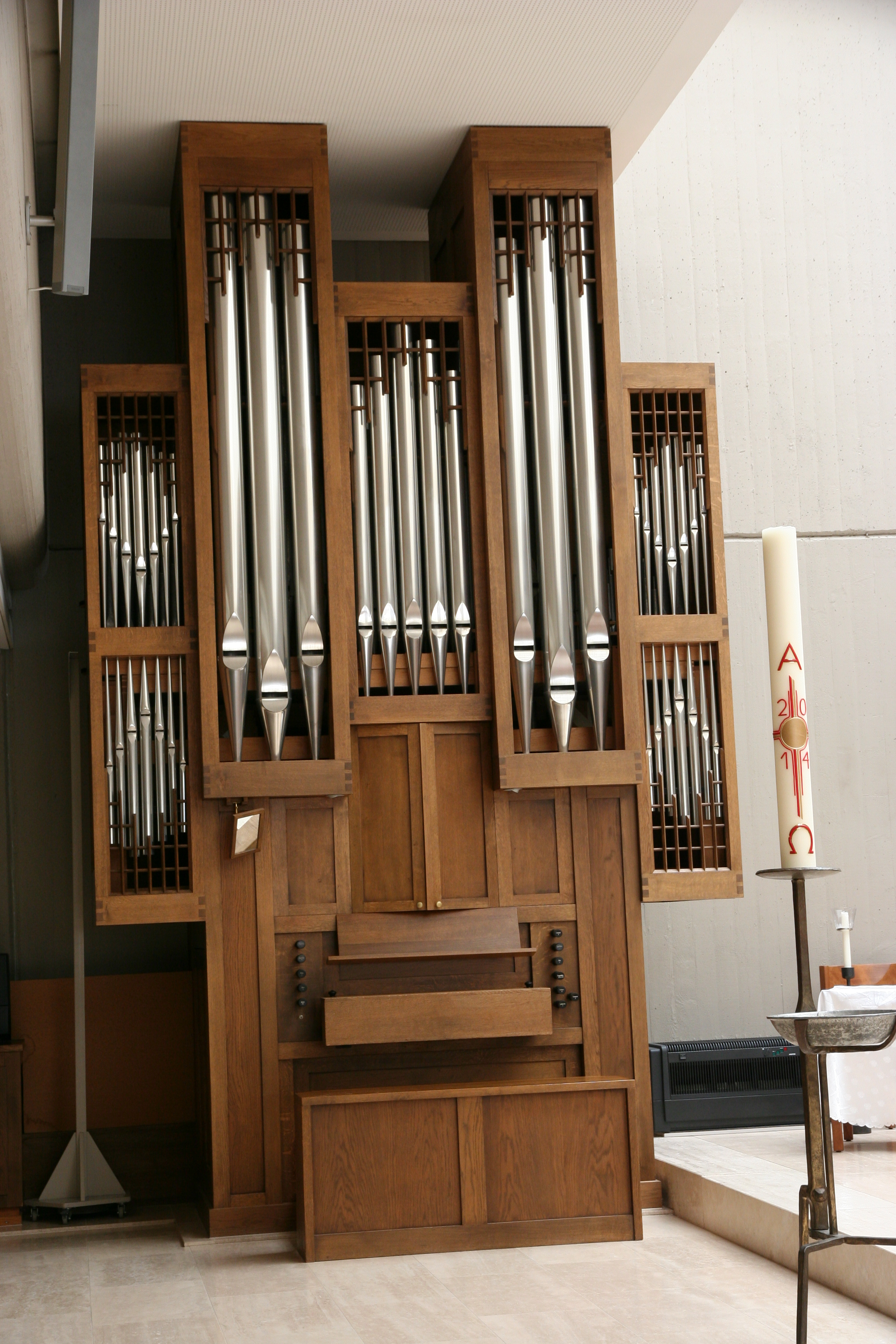 Römisch-katholische Pfarrkirche St. Johannes der Täufer Geroldswil, Orgel